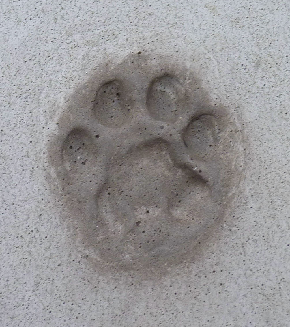 Pfotenabdruck eines Löwen, Zoo Heidelberg